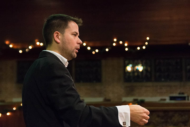 Krashna Musika Najaarsconcert Prinsekerk Rotterdam 2015